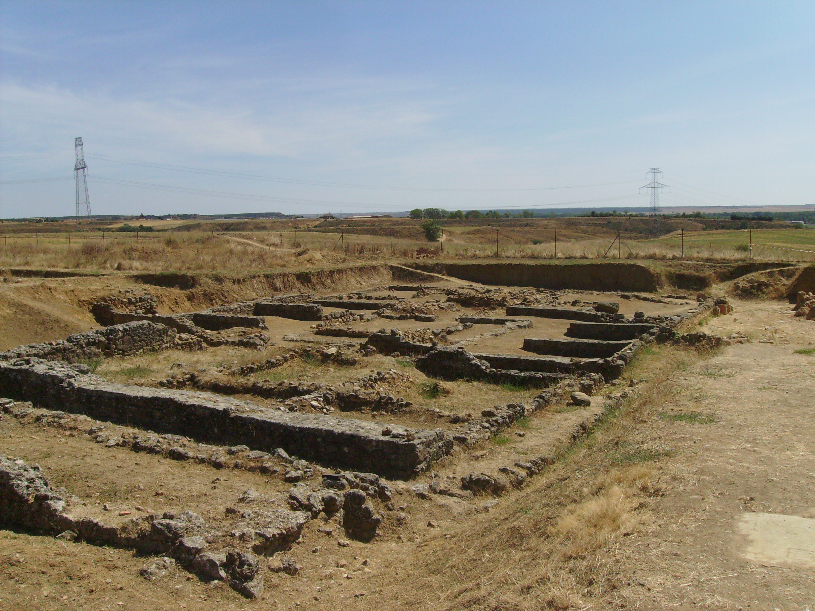 Vista del macellum de la ciudad romana de Lancia, junto a Villasabariego (León, España)